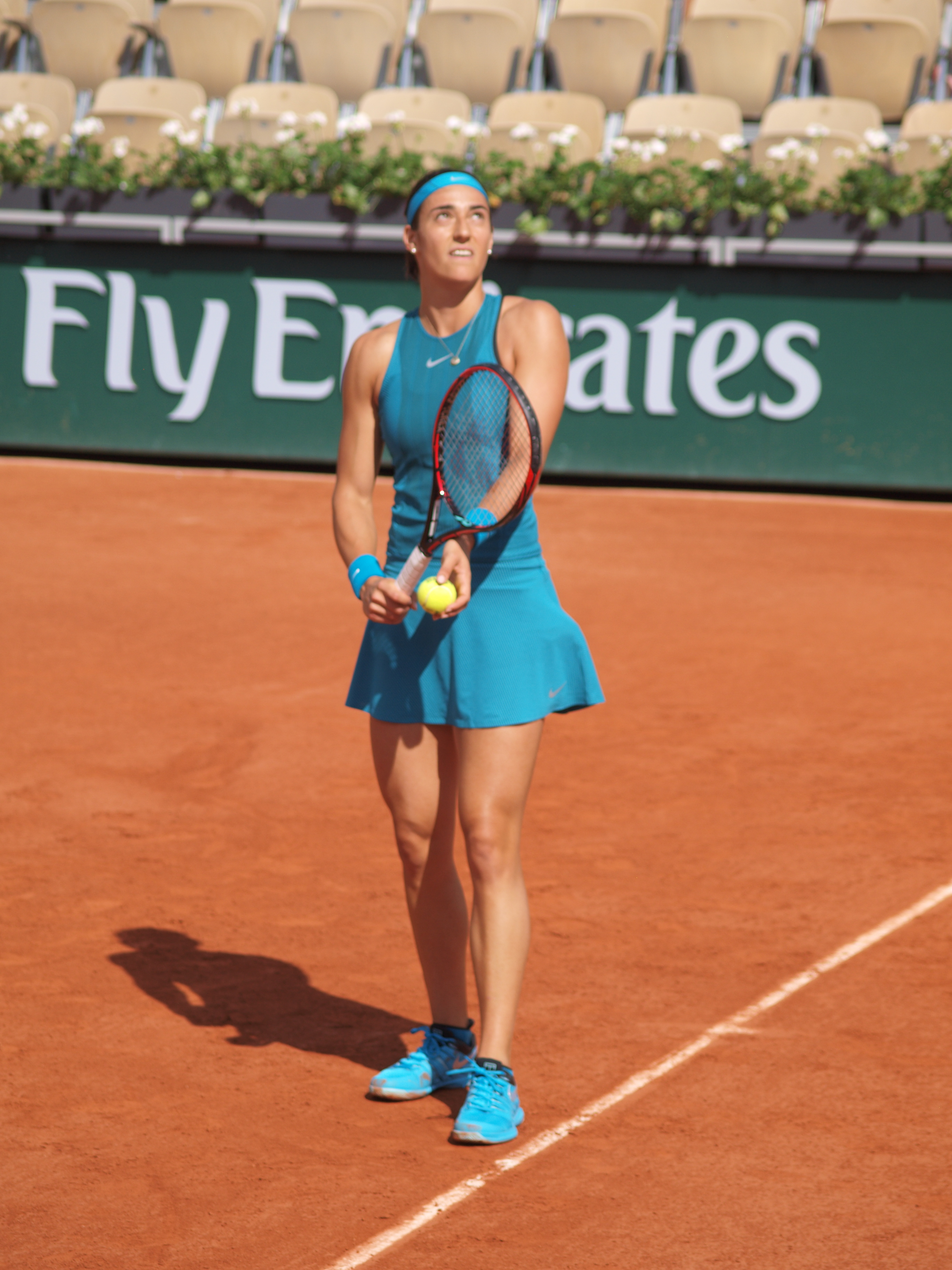 Caroline Garcia, durant le match du 29 mai 2018, sur le court Lenglen (stade Roland Garros) en compétition contre Yingying Duan.